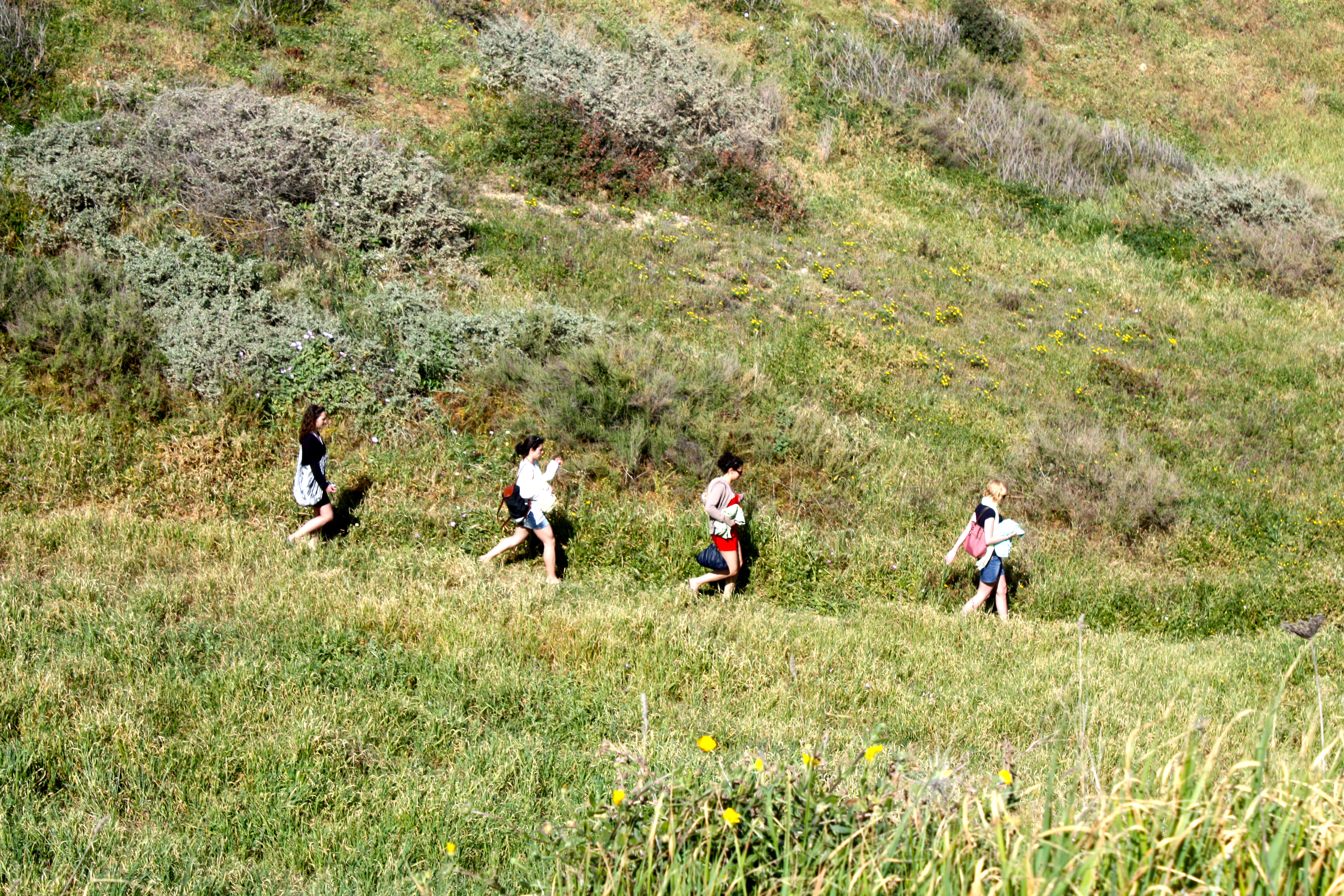 Lagos - 135